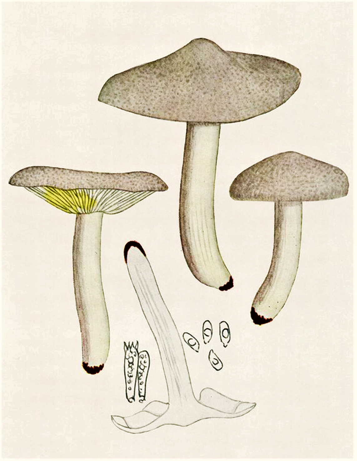 Bres.: Tricholoma argyraceum (Bull., 1789) Gillet (1874) oder Tricholoma argyraceum var. inocybeoides (A.A.Pearson, 1938) Bon (1969)